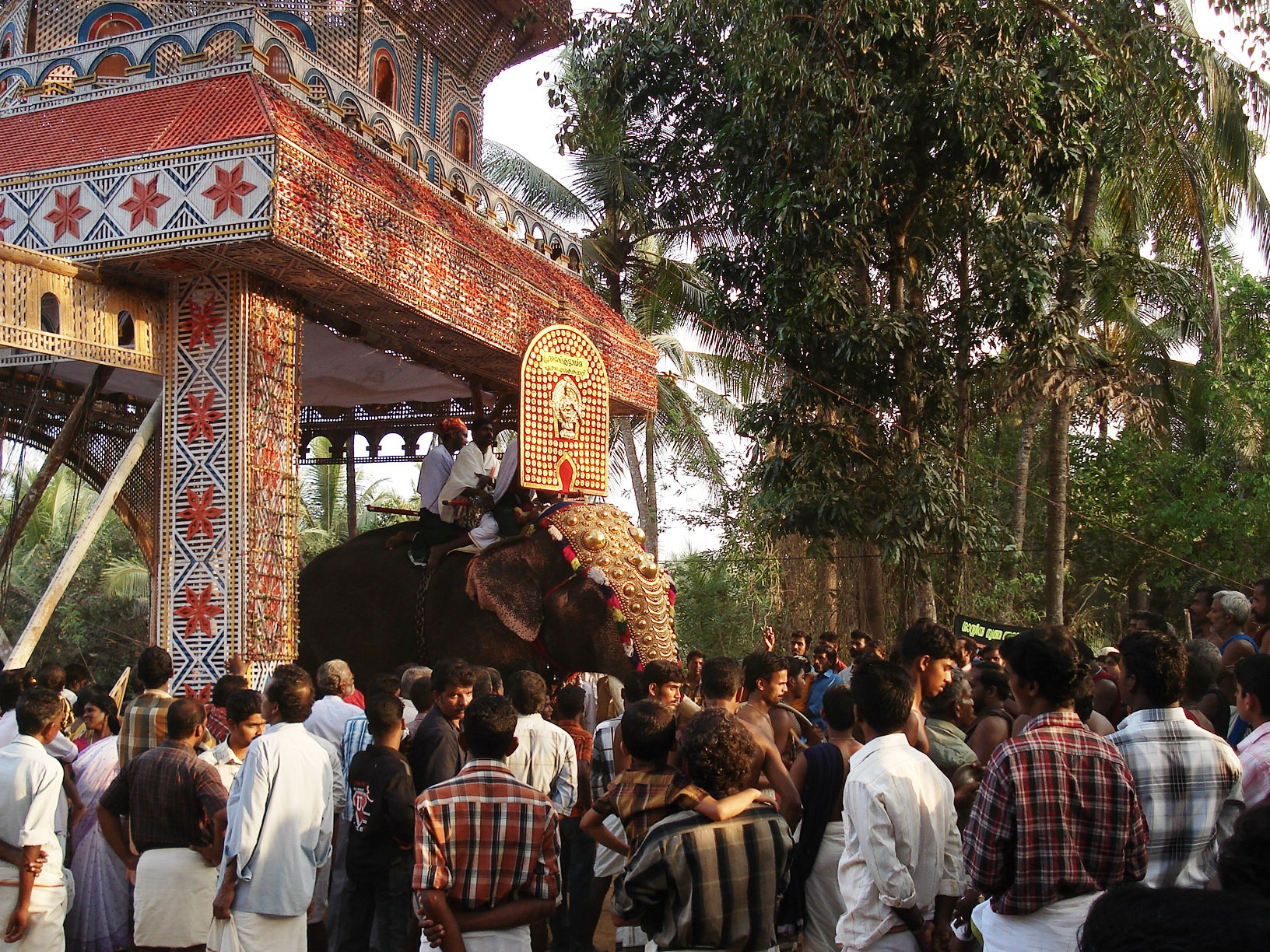 Ezhunnellathu, Chirankara Pooram